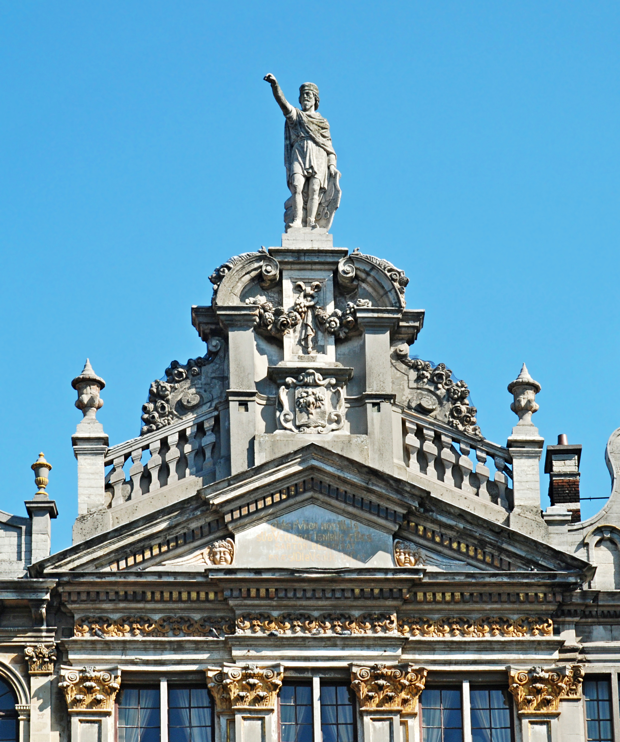 Belgique - Bruxelles - Grand-Place - Maison de la Chaloupe d'Or